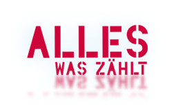 Alles was zählt Logo